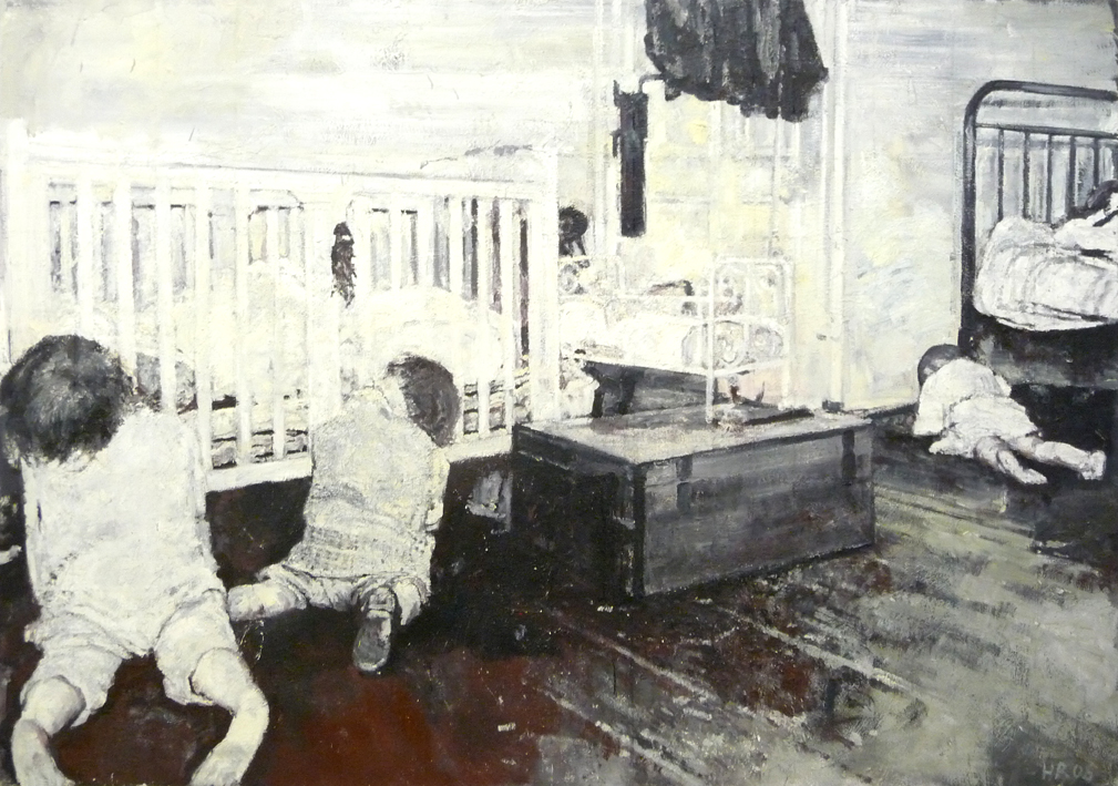 Heike Ruschmeyer, Schlaf Kindlein, schlaf, 2006, Öl auf Leinen, 169 x 240 cm